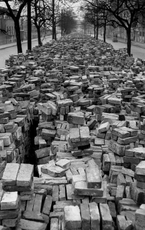 Berlin, Aufbauprogramm Zentralbild/Schack 16.1.1952 Nationales Aufbauprogramm. U.B.z.: Verblüffender Anblick. Die Mittelpromenade der Friedenstrasse in Berlin ist mit geputzten Ziegelsteinen gefüllt, die von freiwilligen Bauhelfern in den letzten Tagen geborgen wurden.